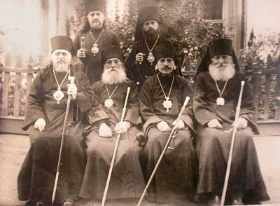 Иерархи Украинской автономной православной церкви в годы Второй мировой войны (сидят: в первом ряду крайний слева - епископ Белгородский и Грайворонский Панкратий (Гладков), второй слева - архиепископ Черниговский и Нежинский Симон (Ивановский), второй справа - епископ Львовский Пантелеймон (Рудык), крайний справа - епископ Винницкий и Подольский Евлогий (Марковский), во втором ряду слева - епископ Екатеринославский и Мелитопольский Димитрий (Маган), справа - епископ Пинский и Полесский Вениамин (Новицкий))